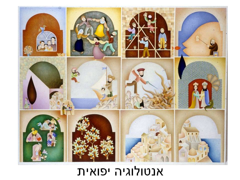 אנתולוגיה יפואית